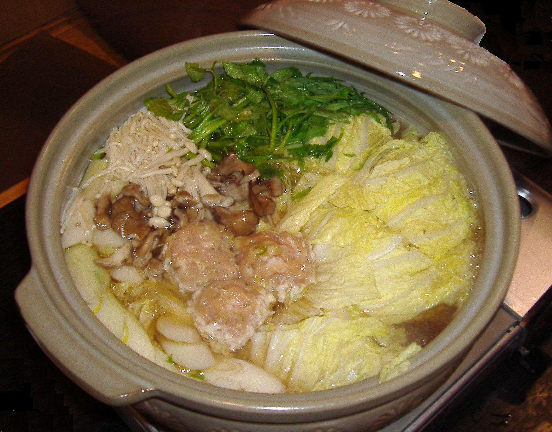 Nabe of Kansai or Osaka style.